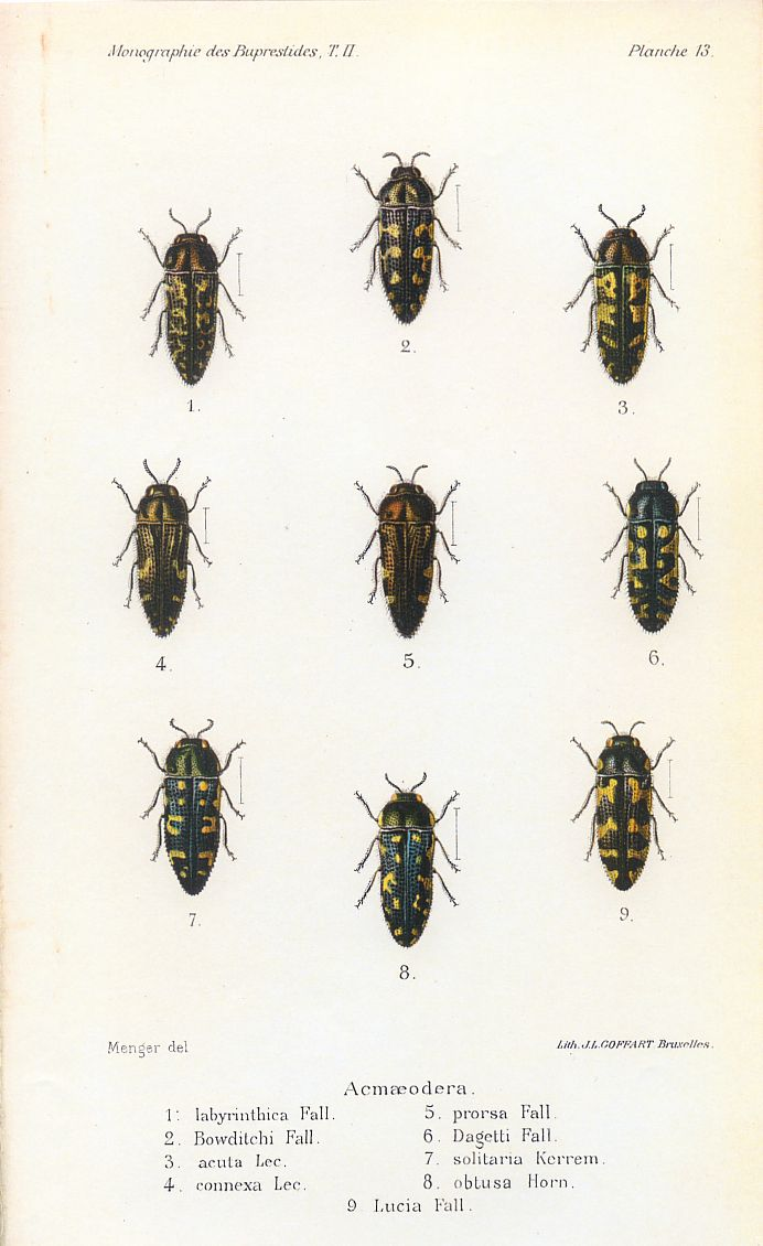 Acmæodera labyrinthica Fall. = Acmaeodera labyrinthica Fall, 1899 Acmæodera Bowditchi Fall. = Acmaeodera bowditchi Fall, 1901 Acmæodera acuta Lec. = Acmaeodera acuta LeConte, 1860 Acmæodera connexa Lec. = Acmaeodera connexa LeConte, 1859 Acmæodera prorsa Fall. = Acmaeodera prorsa Fall, 1899 Acmæodera Dagetti Fall. = Acmaeodera solitaria Kerremans, 1897 Acmæodera solitaria Kerrem. = Acmaeodera solitaria Kerremans, 1897 Acmæodera obtusa Horn. = Acmaeodera obtusa Horn, 1878 Acmæodera Lucia Fall. = Acmaeodera variegata LeConte, 1852